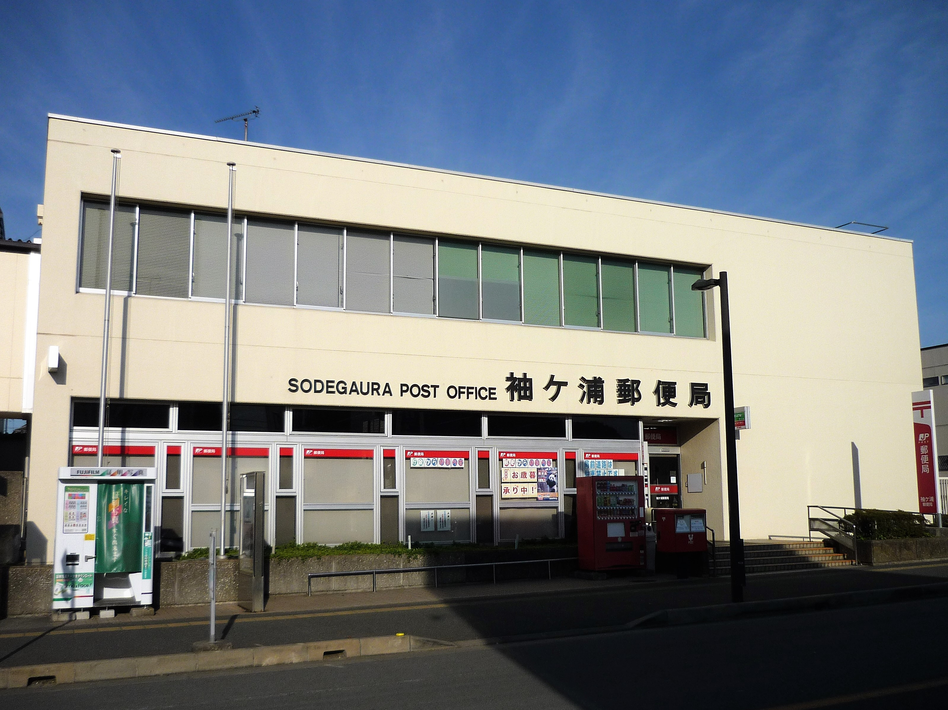 袖ケ浦郵便局（袖ケ浦市福王台） Panasonic Lumix DMC-FS3